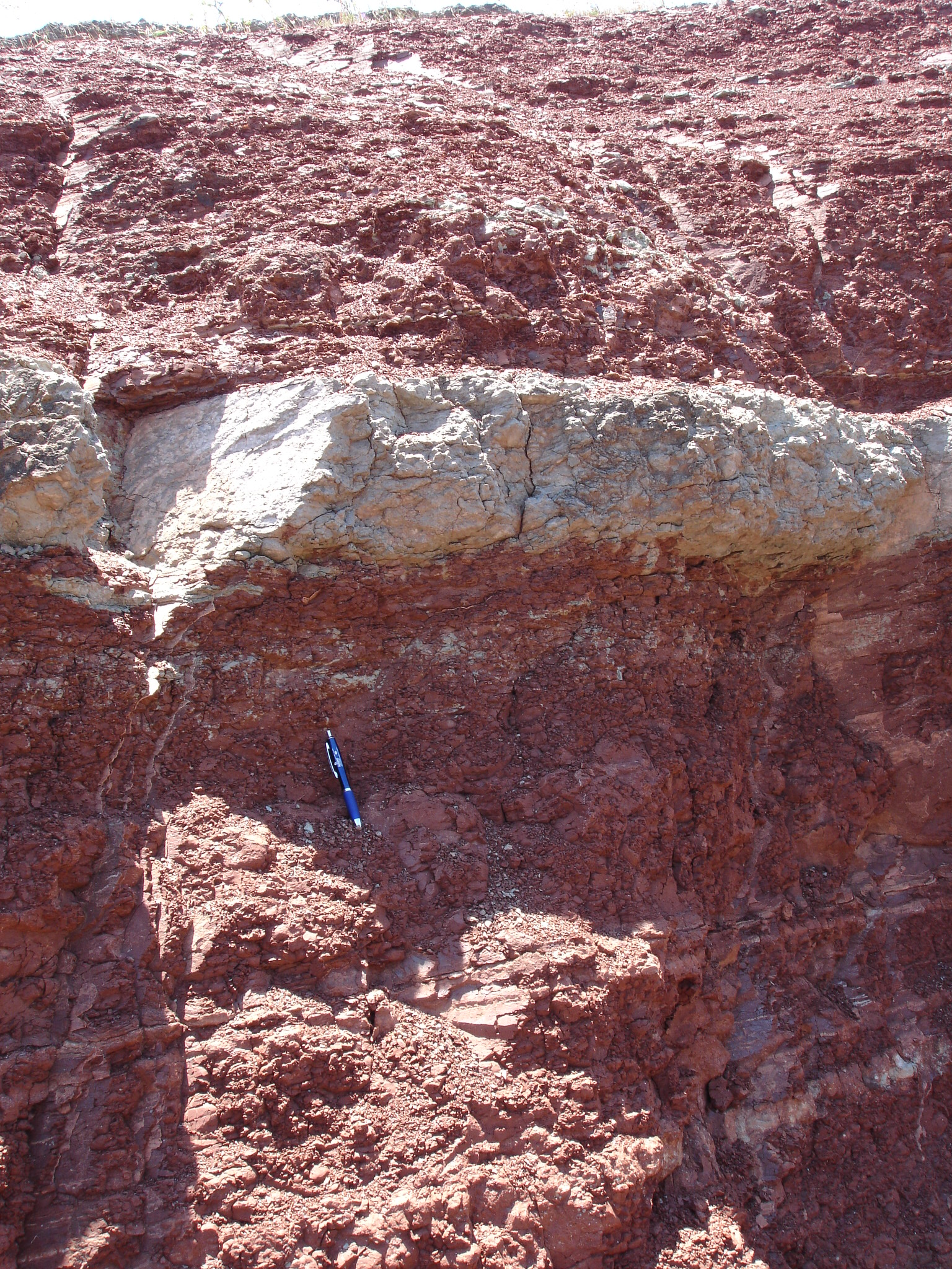 Argilite au Bassin de Lodève en France dans l'Hérault (34), la Lieude, Mérifons. Argile rouge avec du fer oxydé, argile bleu vert avec du fer